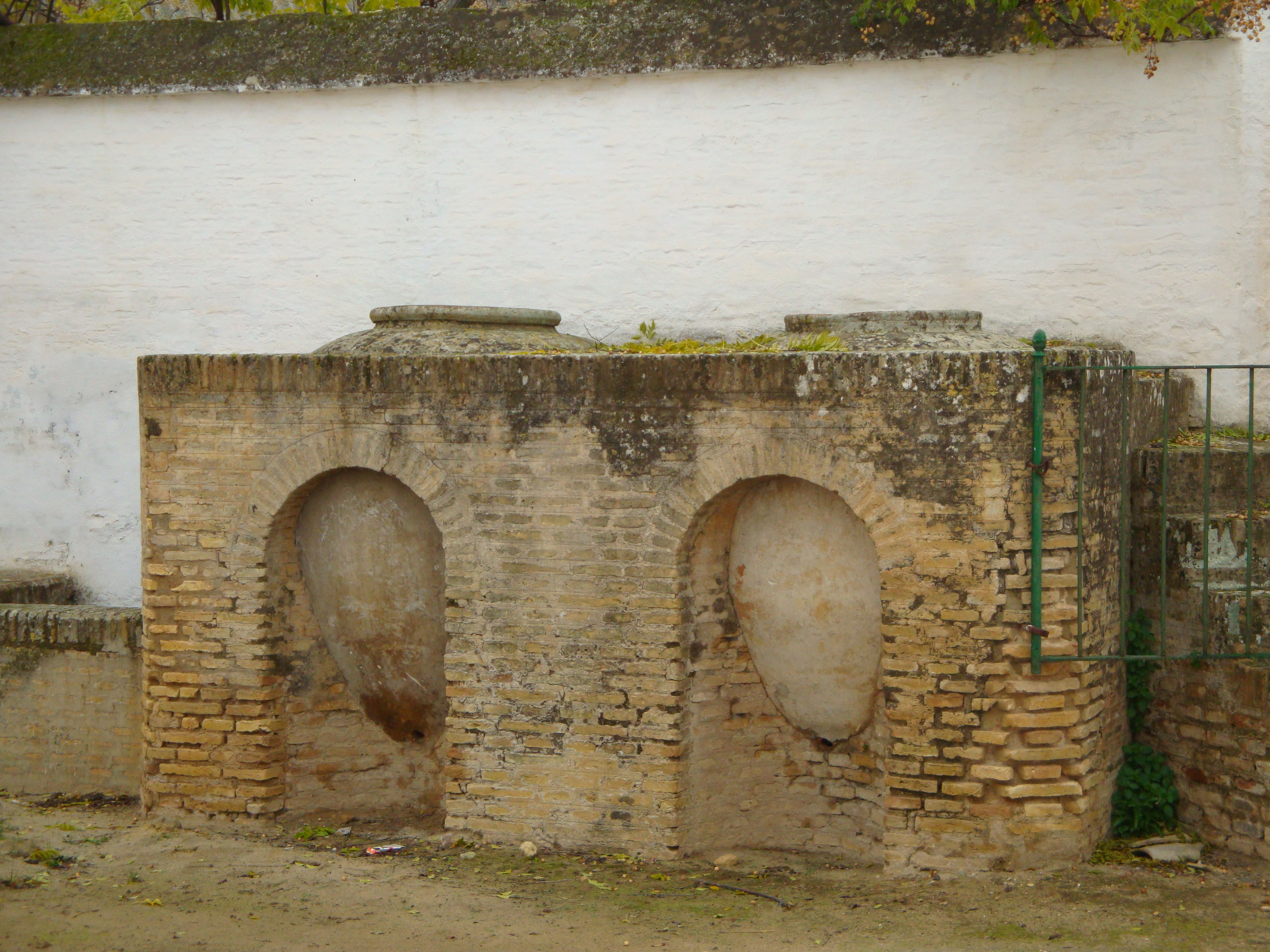 Antiguas tinajas ubicada en una hacienda de olivar